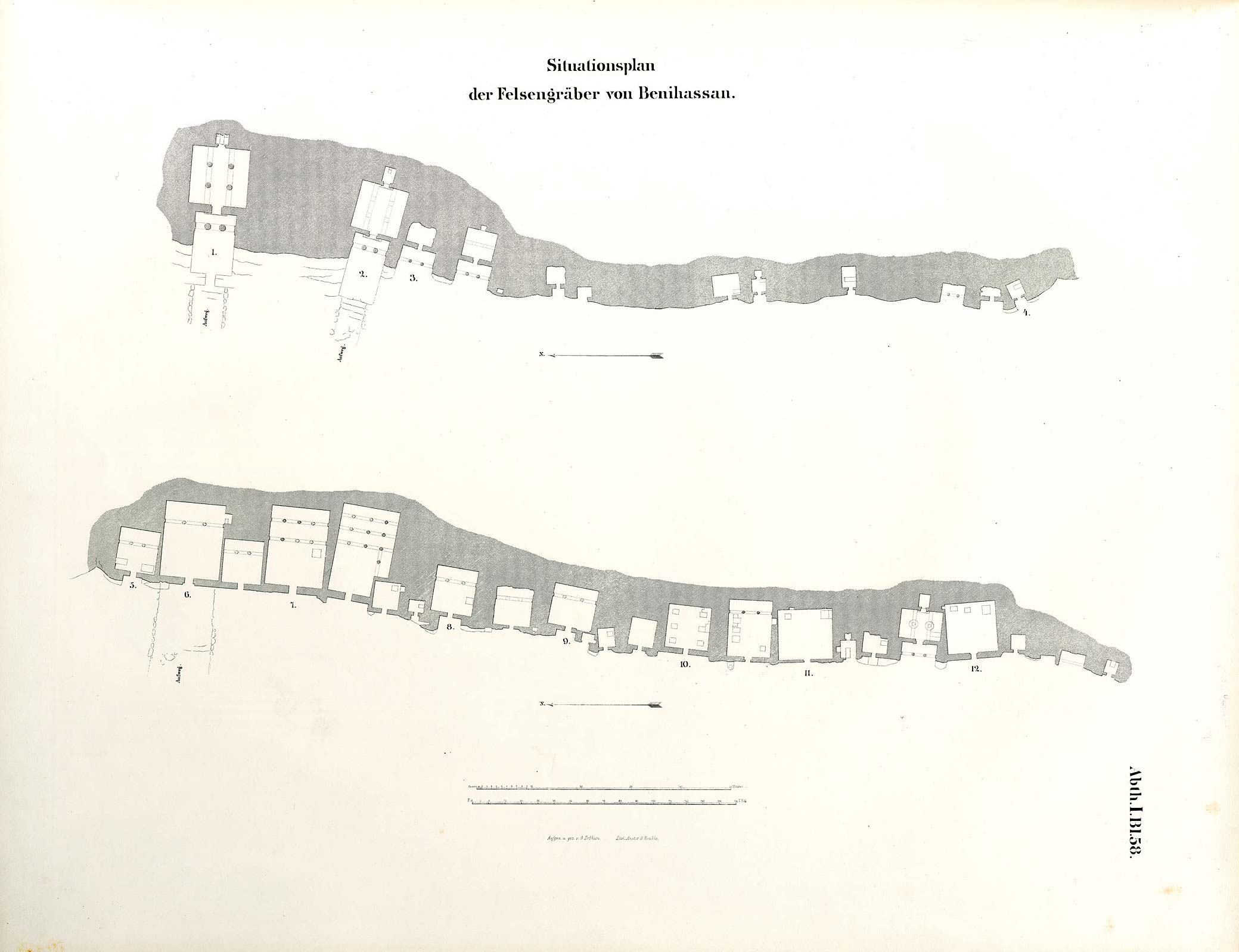 Plan of the Beni Hasan necropolis. Note that Lespius' numeration is different than the one adopted later: Lepsius 1 is BH2 (Ameny), 2 is BH3 (Khnumhotep II), 3 is BH4 (Khnumhotep IV), 5 is BH14 (Khnumhotep I), 7 is BH17 (Khety). Denkmaeler aus Aegypten und Aethiopien nach den Zeichnungen der von Seiner Majestät dem Koenige von Preussen, Friedrich Wilhelm IV., nach diesen Ländern gesendeten, und in den Jahren 1842–1845 ausgeführten wissenschaftlichen Expedition auf Befehl Seiner Majestät